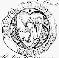 Arnoul de Rumigny